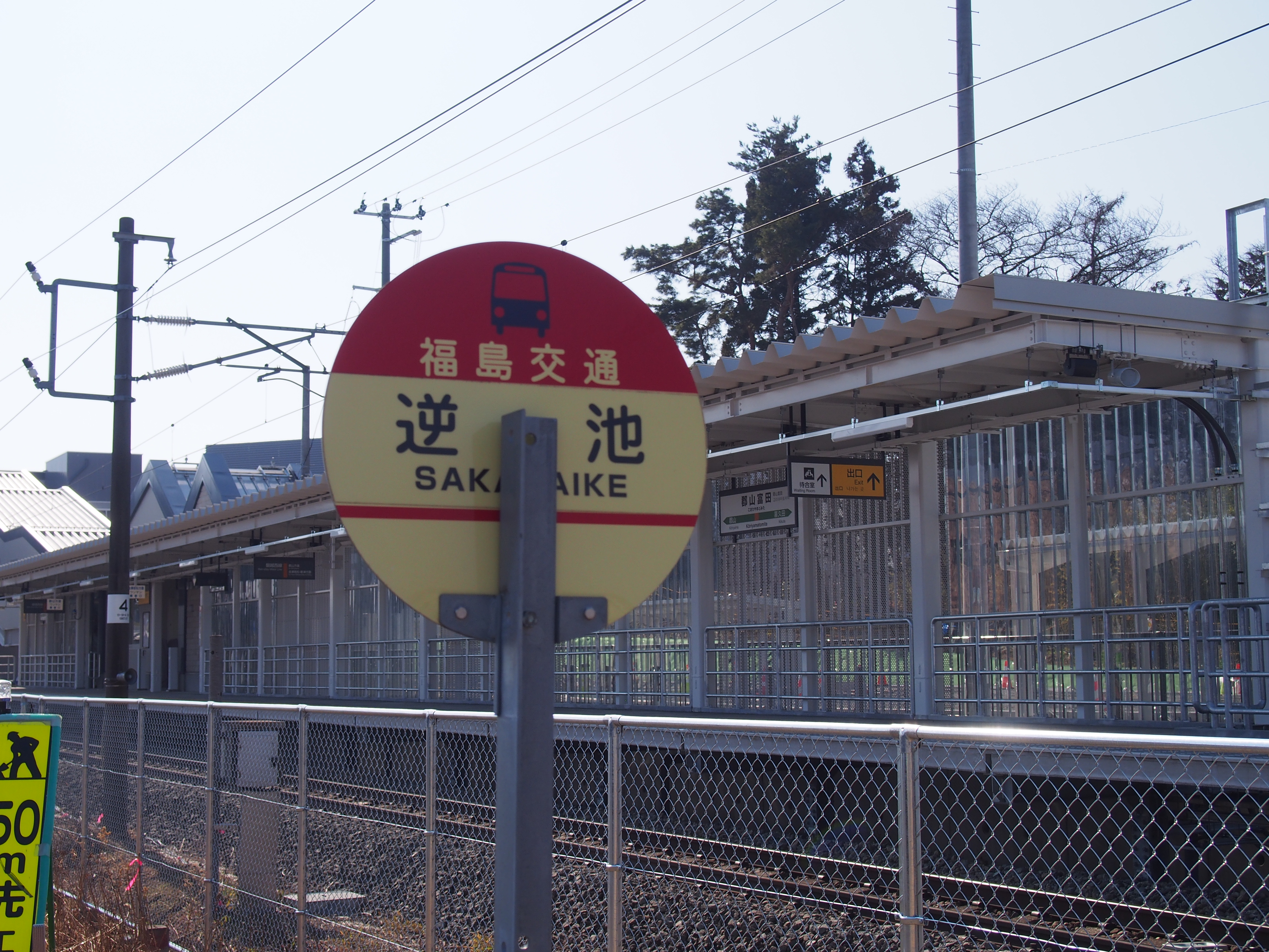 郡山富田駅に隣接する「逆池」バス停。